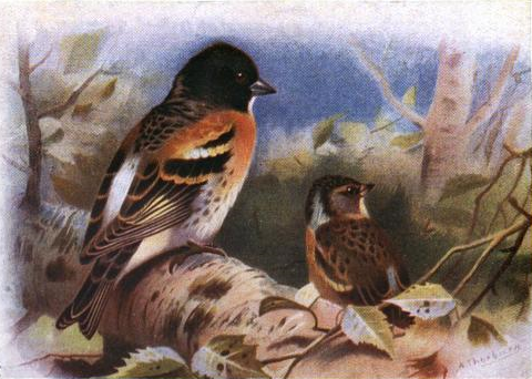 Brambling